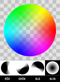 Exempel på alfakanal